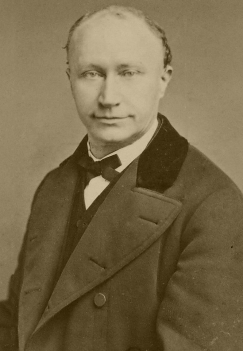 Honoré Joseph Chavée (1815 - 1877) est un anthropologue et linguiste belge.